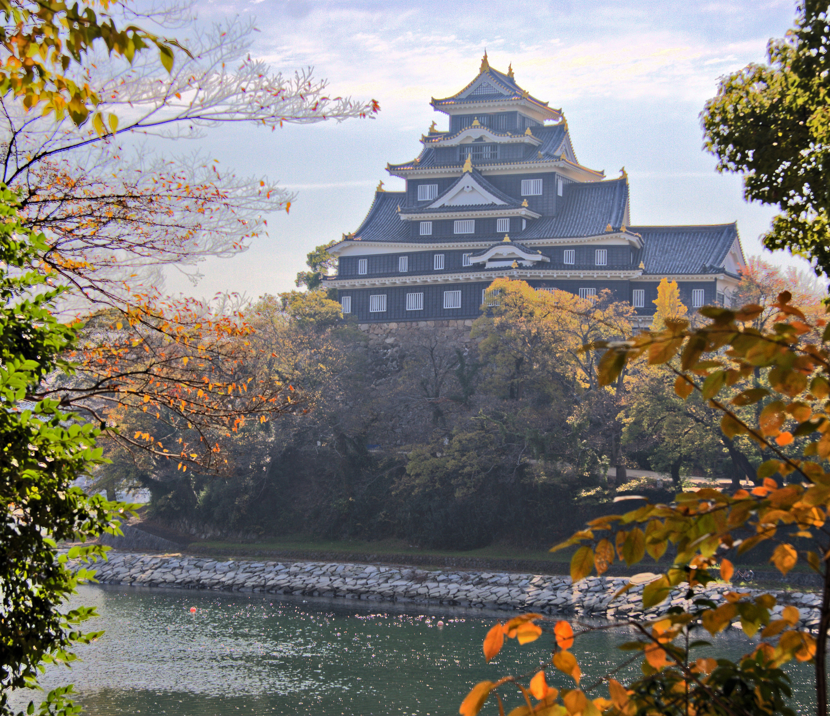 Okayama Castle from Korakuen